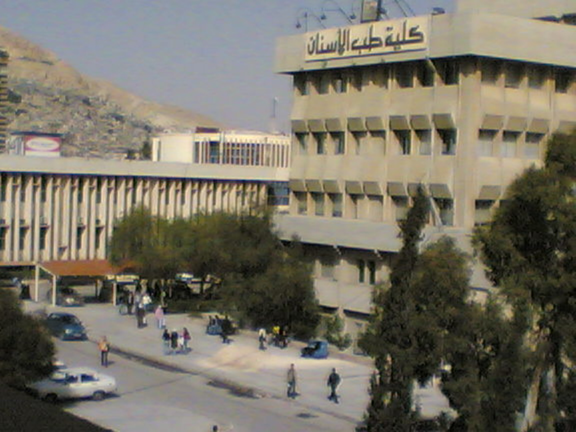 الحرم الجامعي لكلية طب الأسنان لجامعة دمشق - سوريا